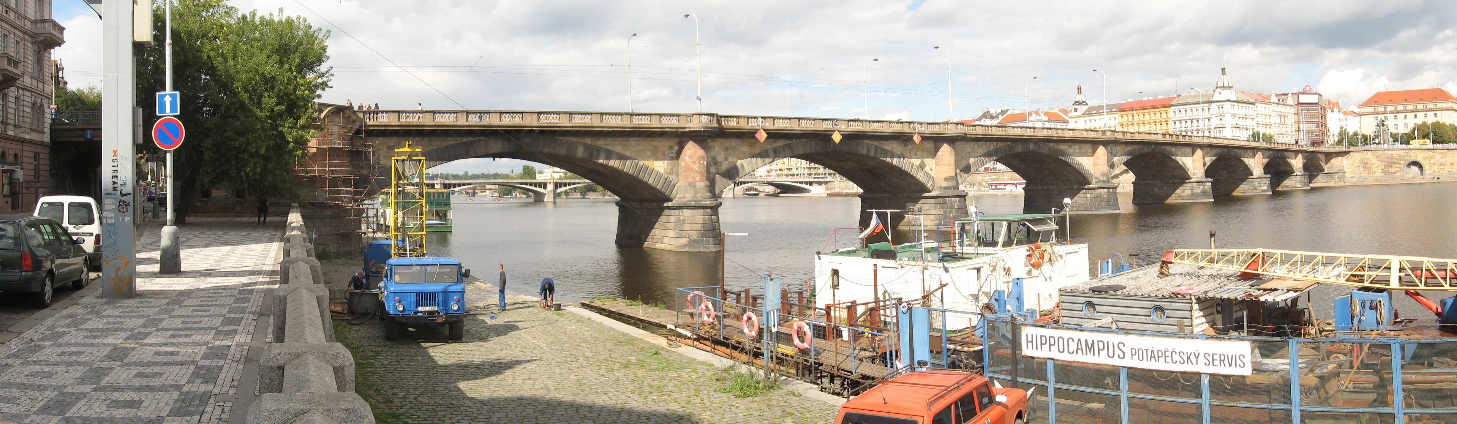 Palackého most z Hořejšího nábřeží, Praha, složeno ze 4 snímků pomocí programu hugin